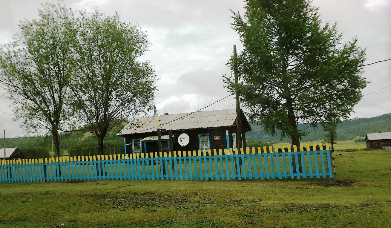 Администрация с. Бортой